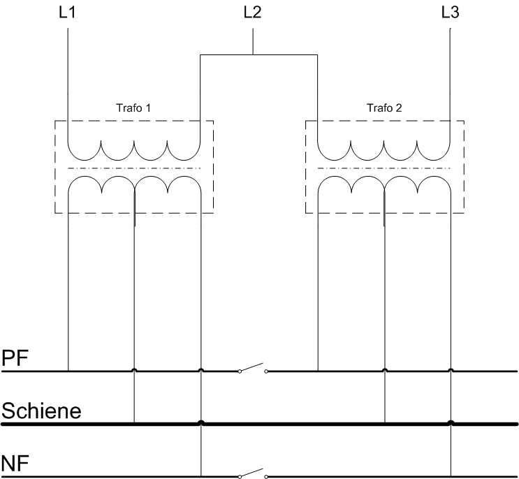 Aufbauprinzip des Unterwerkes